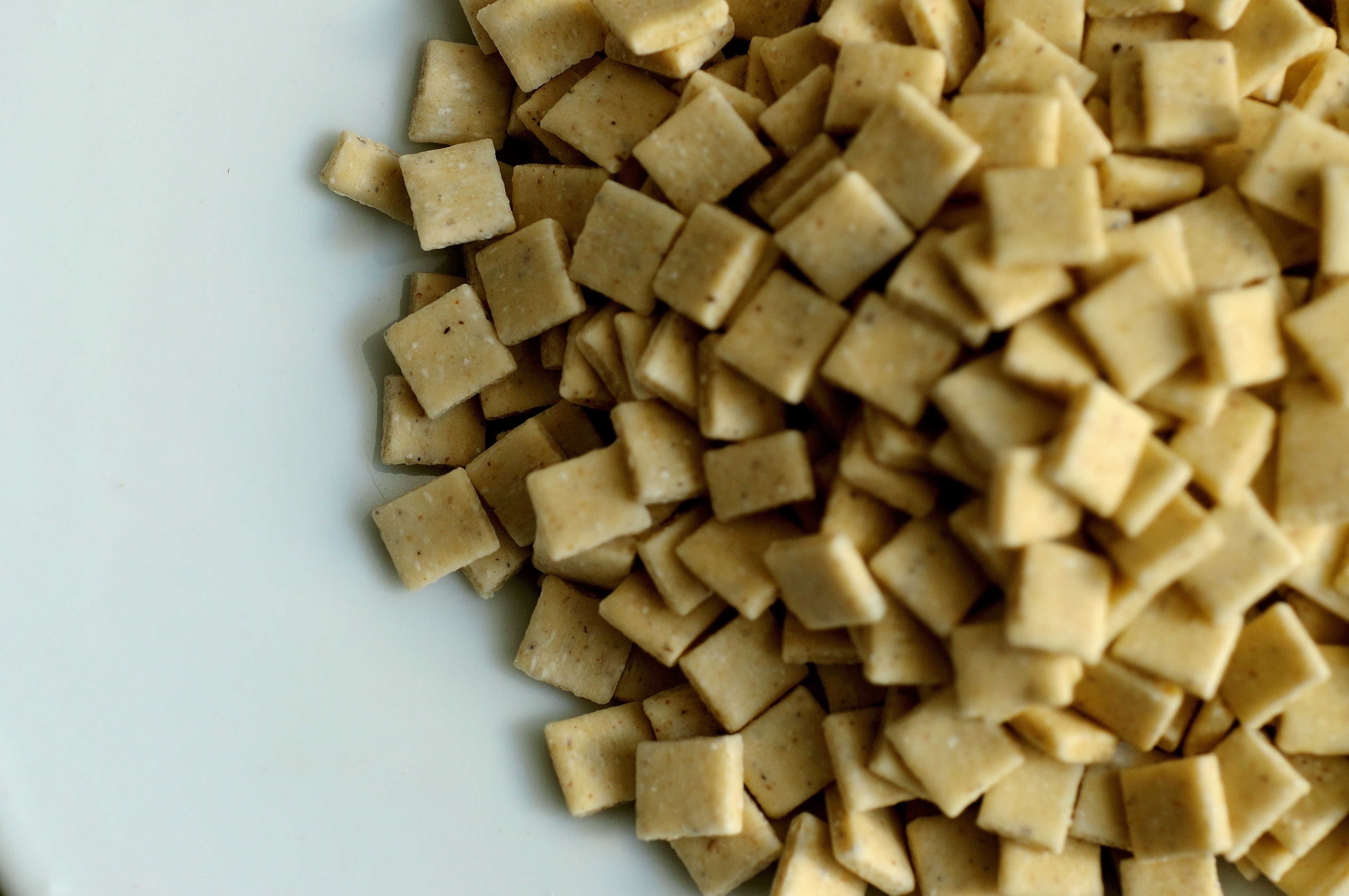 Des crozets au sarrazin, spécialité de pâtes alimentaires de Savoie.